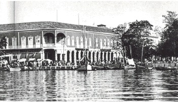 Puerto de Maracaibo, Venezuela, Estado Zulia, a finales del siglo XIX.